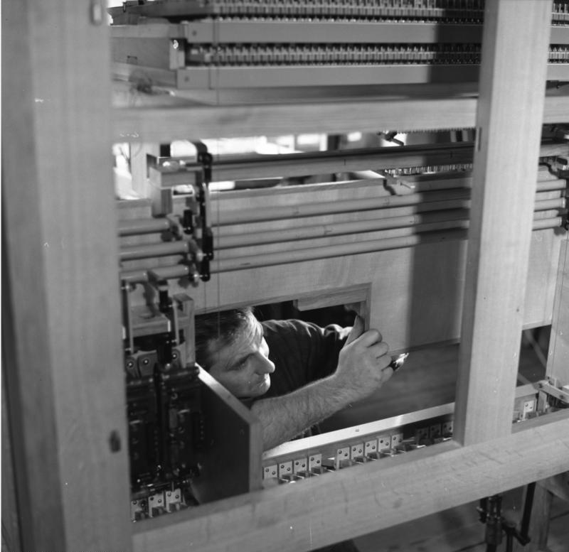 Orgelbauwerkstatt Klais, Bonn